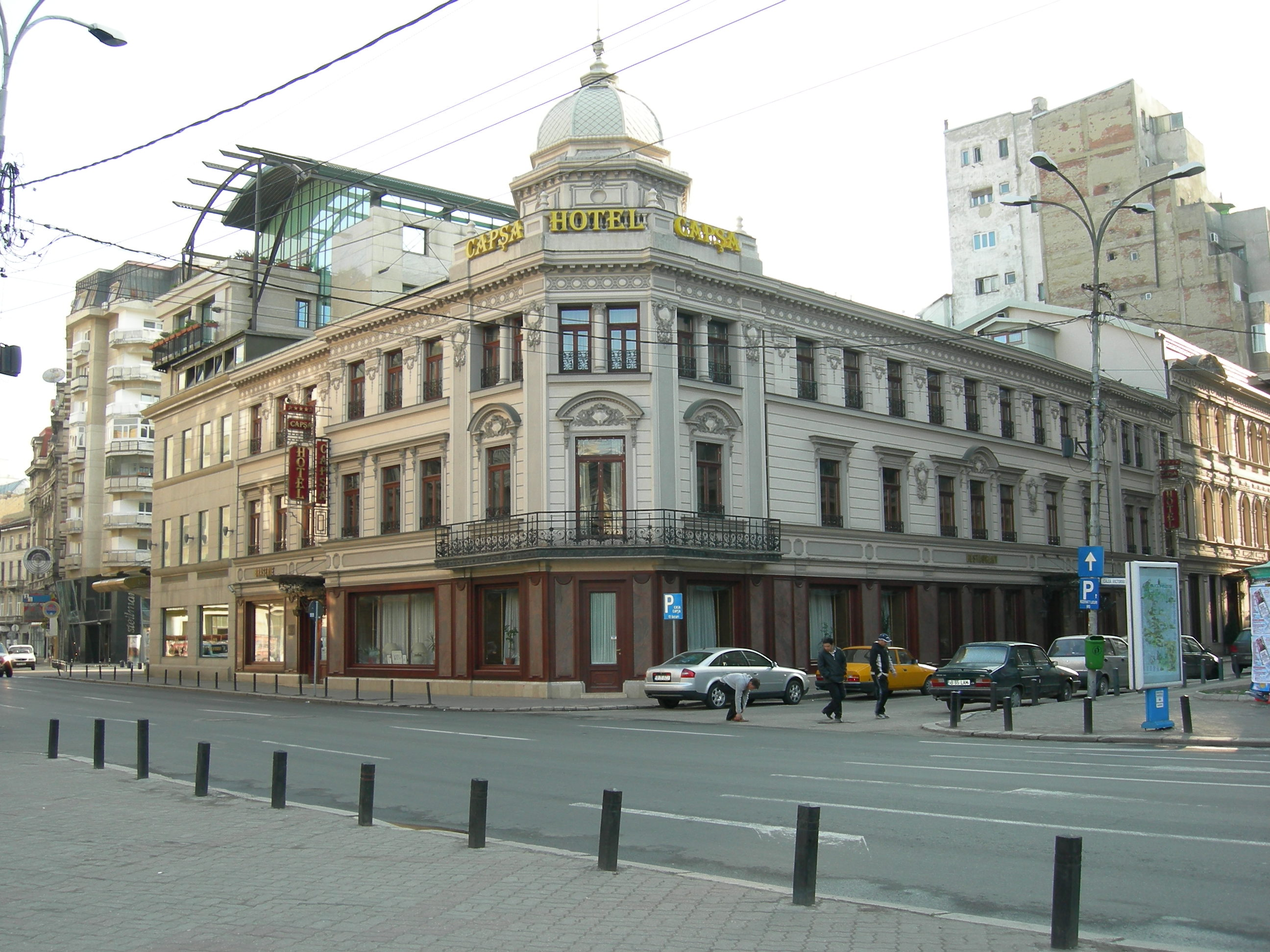 Casa Capşa, Calea Victoriei, Bucharest, Romania